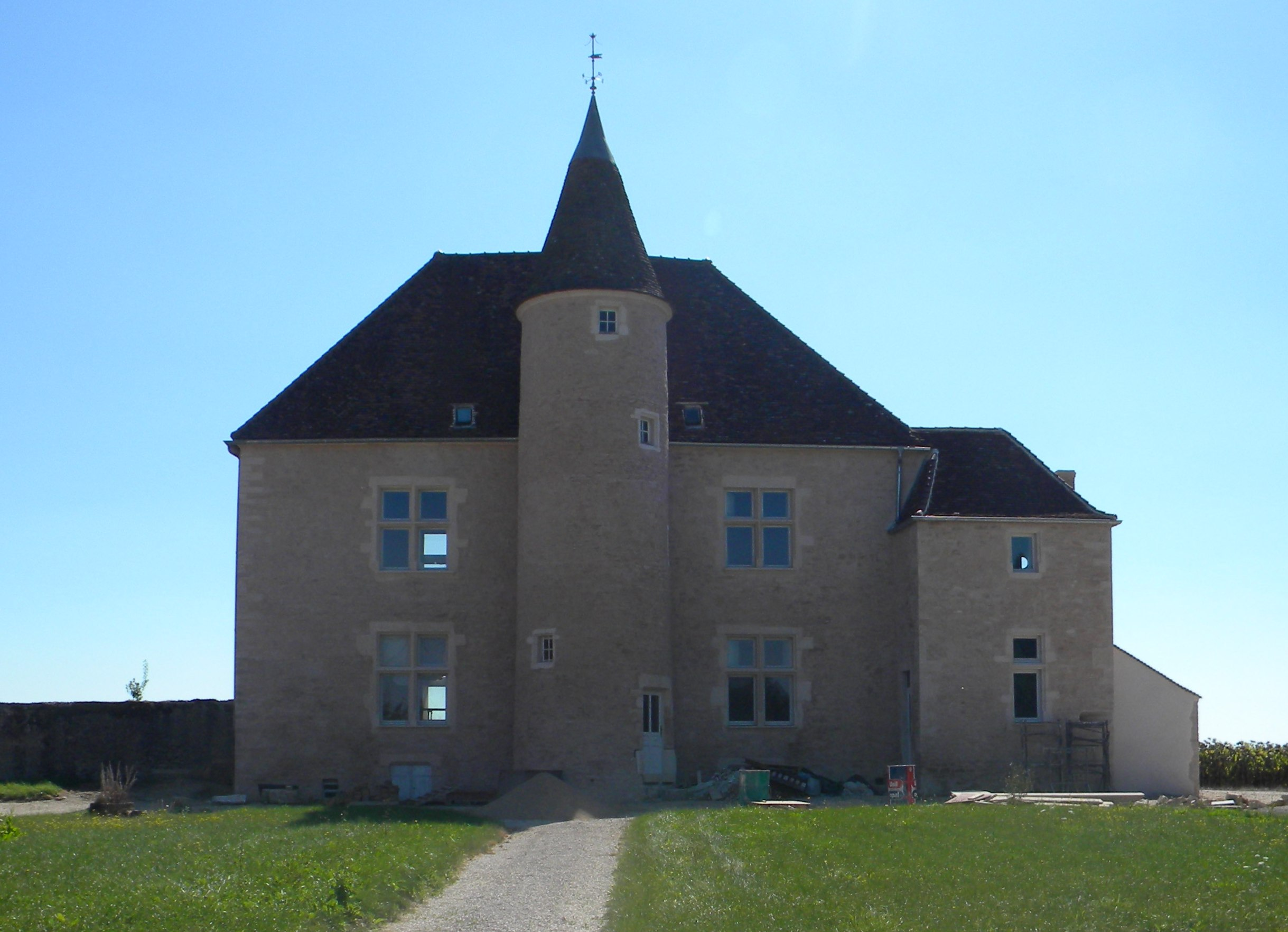 Moux